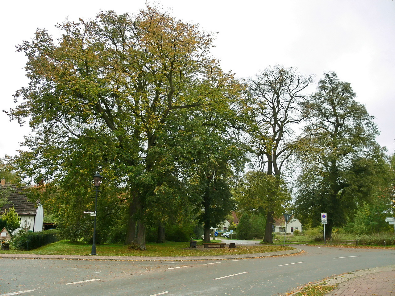 Der ehm. Standort vom "Haus zum gelben Sande" - The ex-location of the "Haus zum gelben Sande"